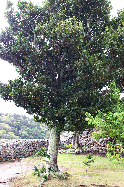 フクギ （沖縄県今帰仁村） Garcinia subelliptica (Nakijin-Village, Okinawa, JAPAN)